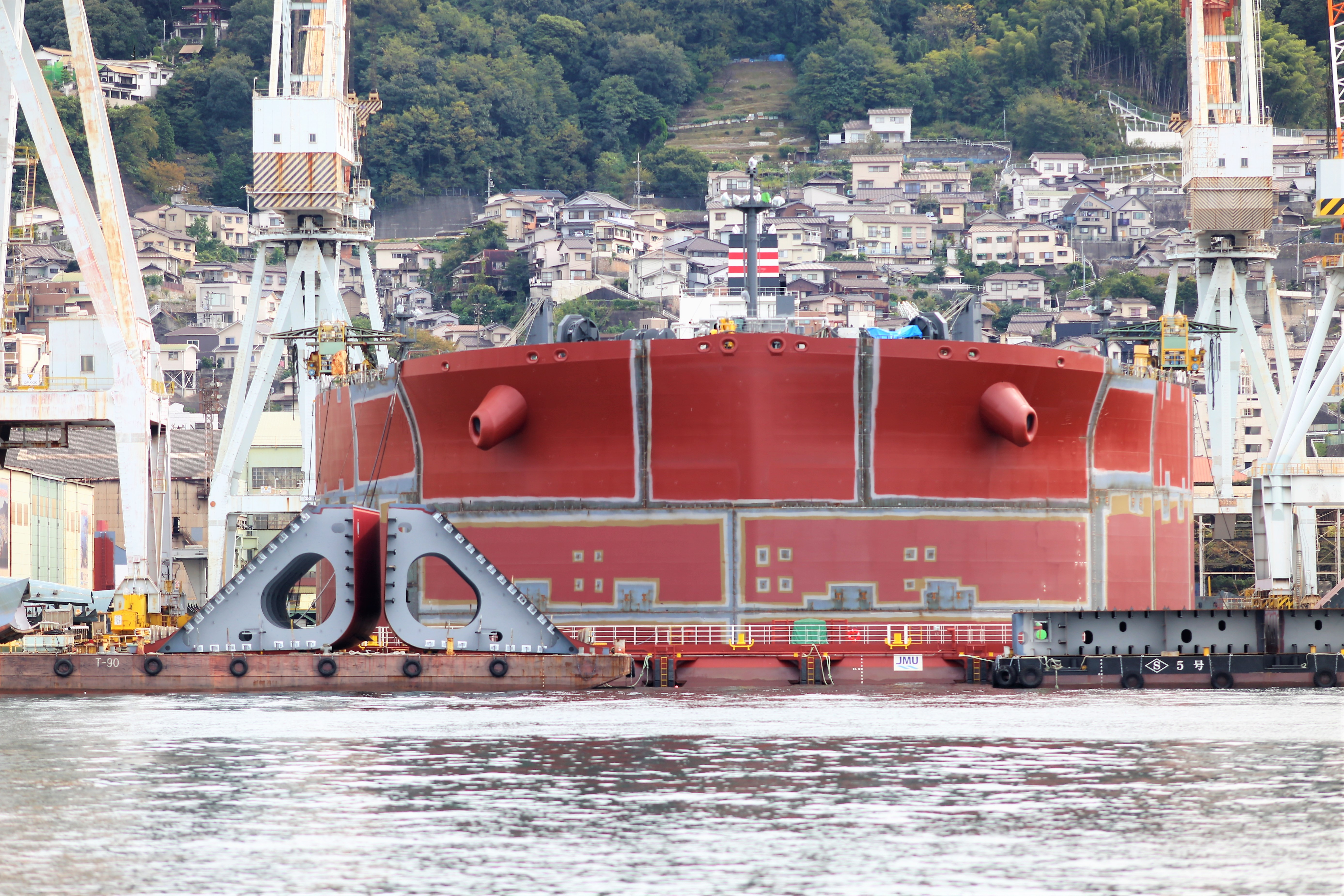 ブロック工法で接合された31万トンタンカー。広島県呉市のジャパン マリンユナイテッド呉工場。